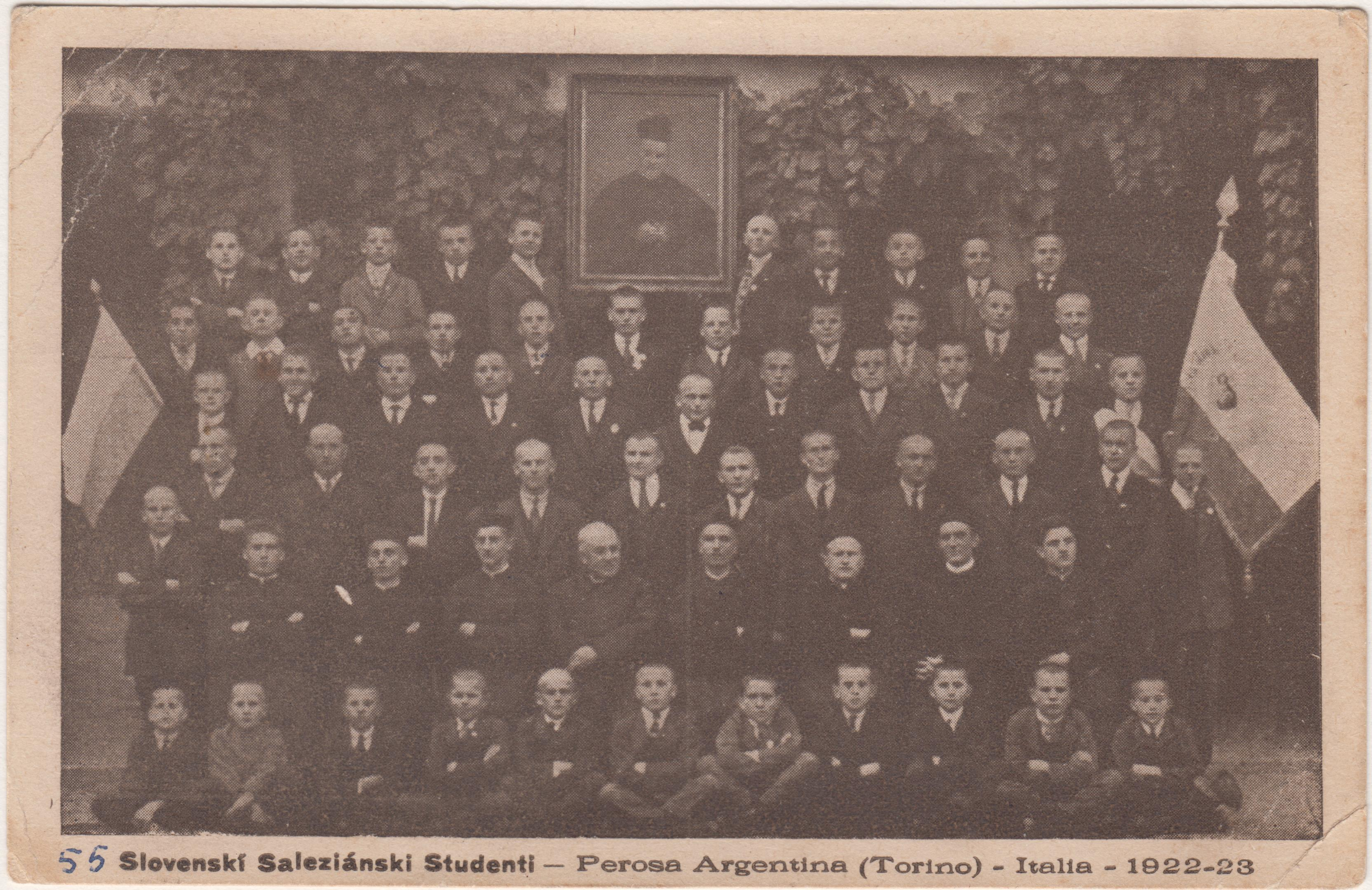 V roku 1921 slovenskí saleziáni otvorili súkromné Slovenské gymnázium v severnom Taliansku v obci Perosa Argentina. Na tomto gymnáziu študovalo okolo 100 študentov. Na fotografii sú študenti s profesormi zo školského roku 1922/1923.